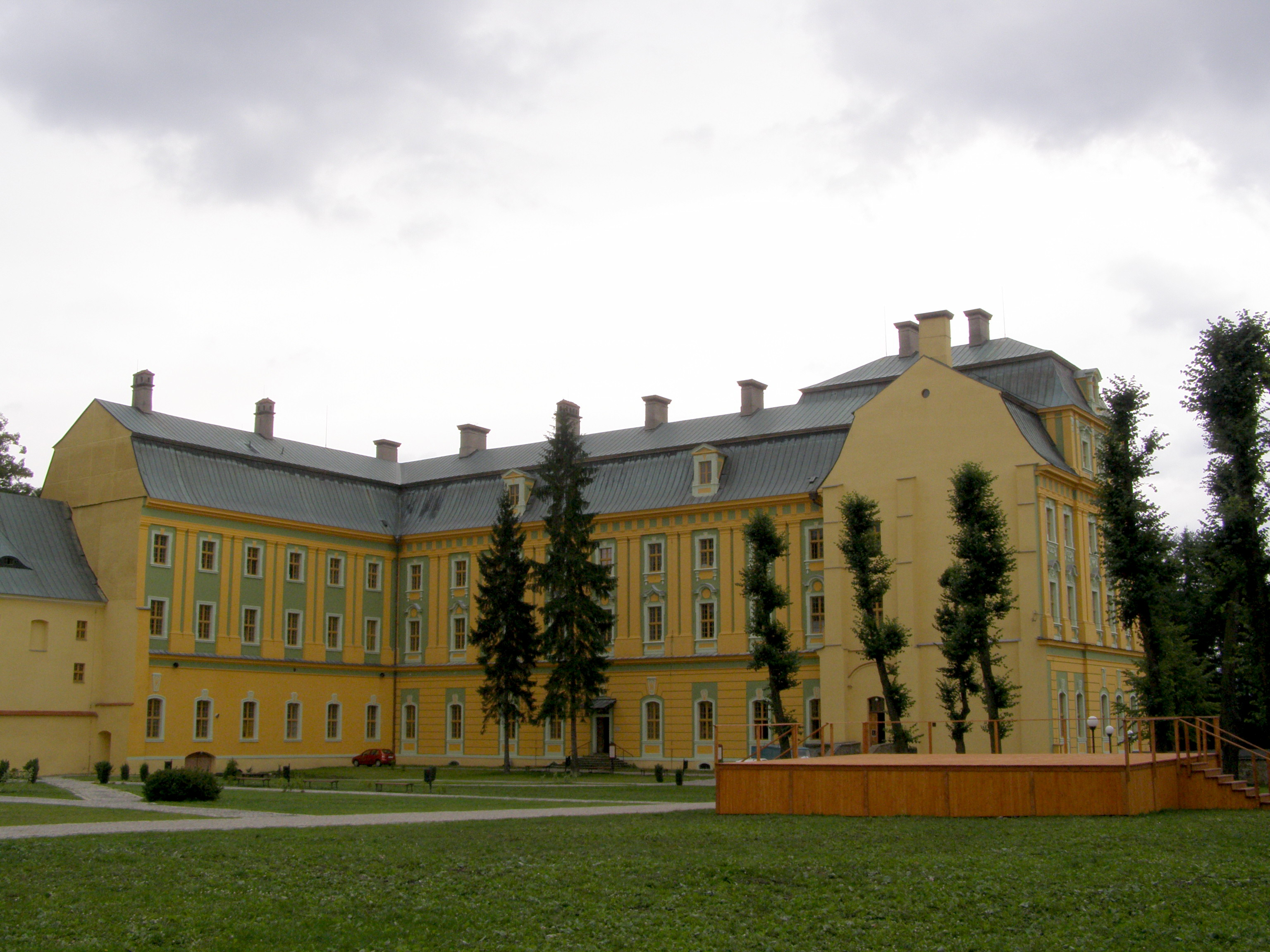 Krzeszów, nejstarší část benediktinského opatství